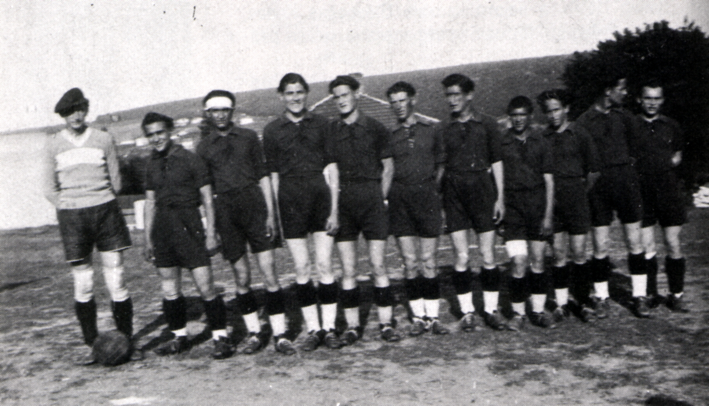 Српски (ћирилица): Екипа из 1937. године: Алберт Котник, Тодор Ђорђевић, Душан Милосављевић, Новица Радојковић, Љуба Цветковић, Јохан Силберхорн, Никола Младеновић, Драган Миловановић, Петар Перић, Сретен Милентијевић и Срећко Величковић.